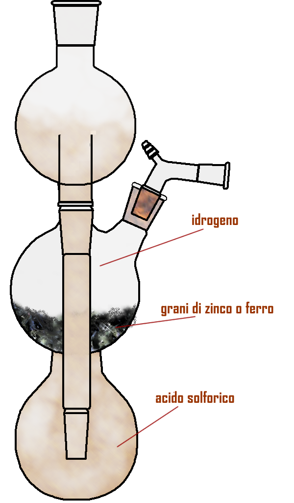 autore: Luigi Capozzi (Campidiomedei) anno: 2006